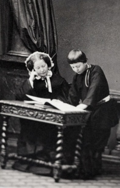 Графиня Мари́я Фёдоровна Соллогу́б, в девичестве — Сама́рина (1821— 1888) с сыном